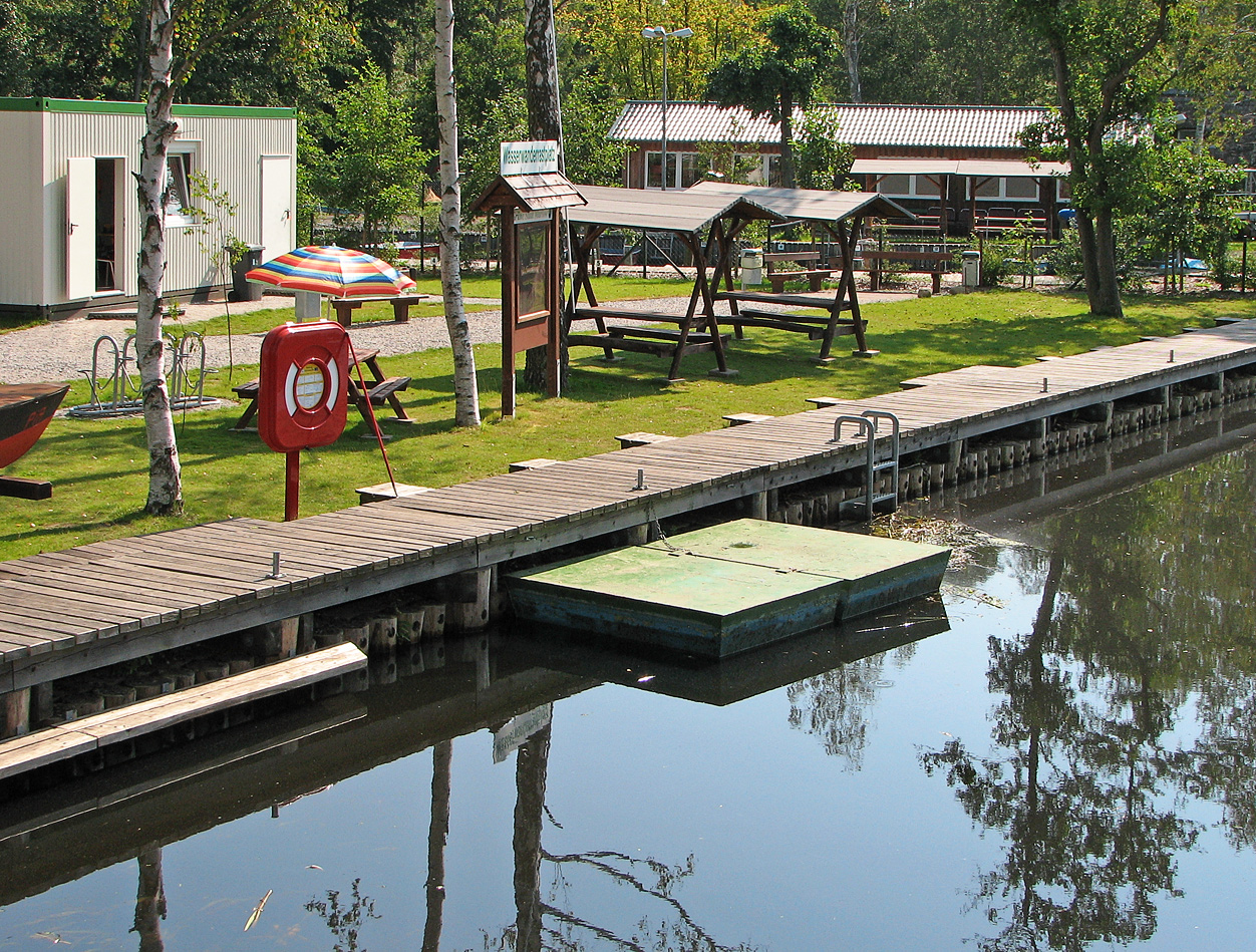 Dieses Bild zeigt den Wasserwanderrastplatz Marlow an der Recknitz.